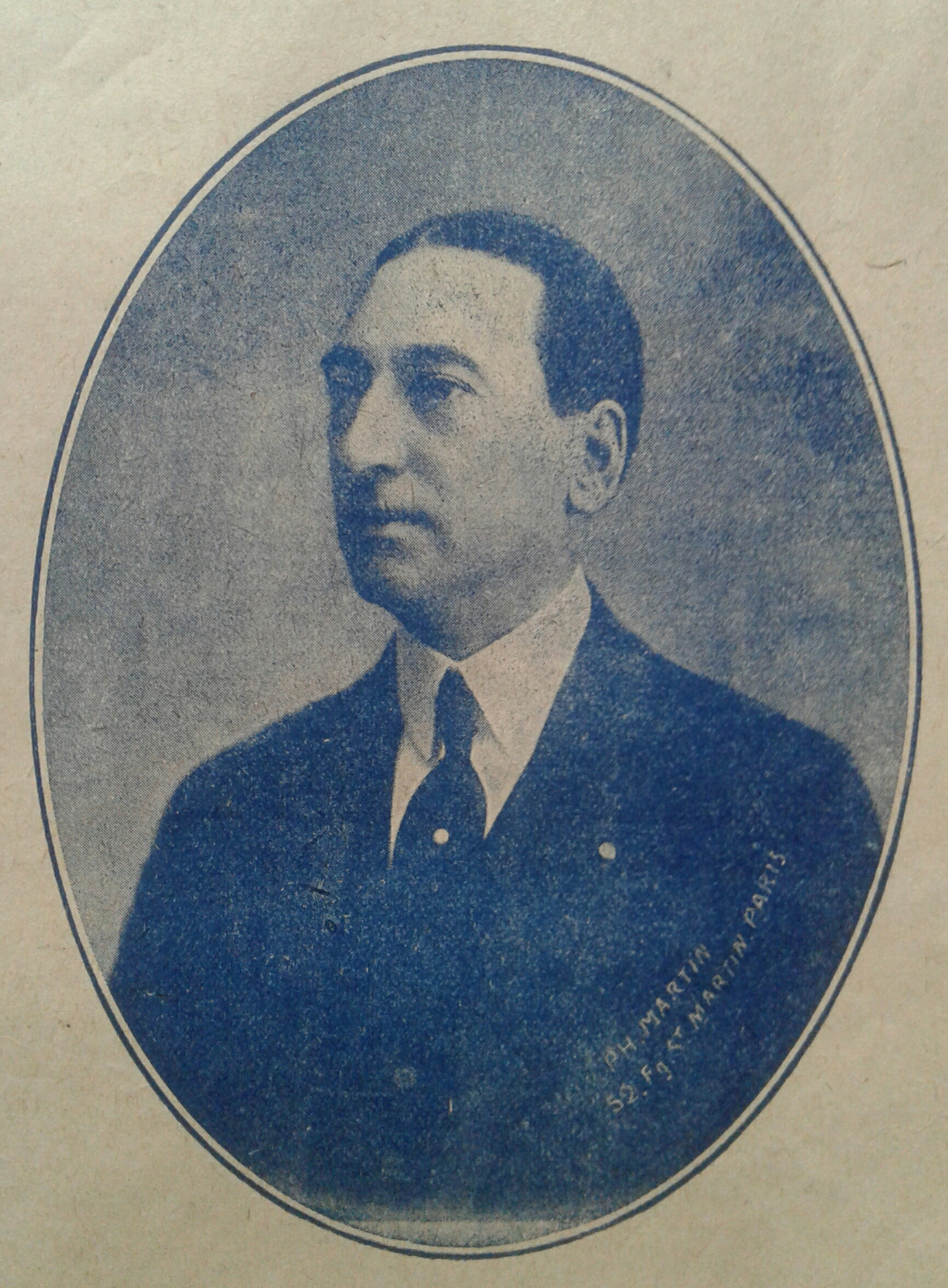 Portrait photo du compositeur Henri Christiné pour ses recueils de partitions.